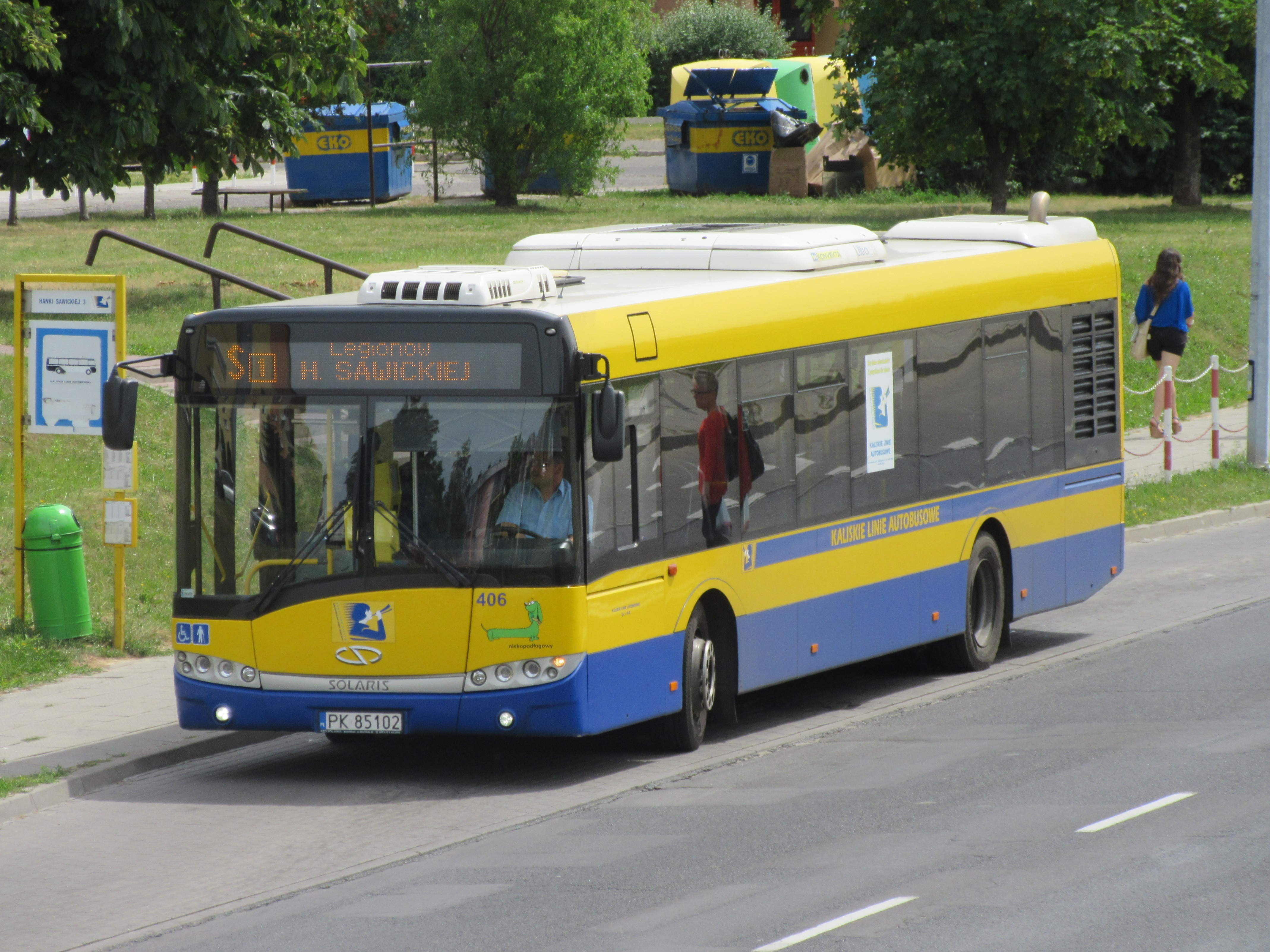 Solaris Urbino 12 Kaliskich Linii Autobusowych na przystanku Sawickiej Arena (ob. Wyszyńskiego Arena) w Kaliszu